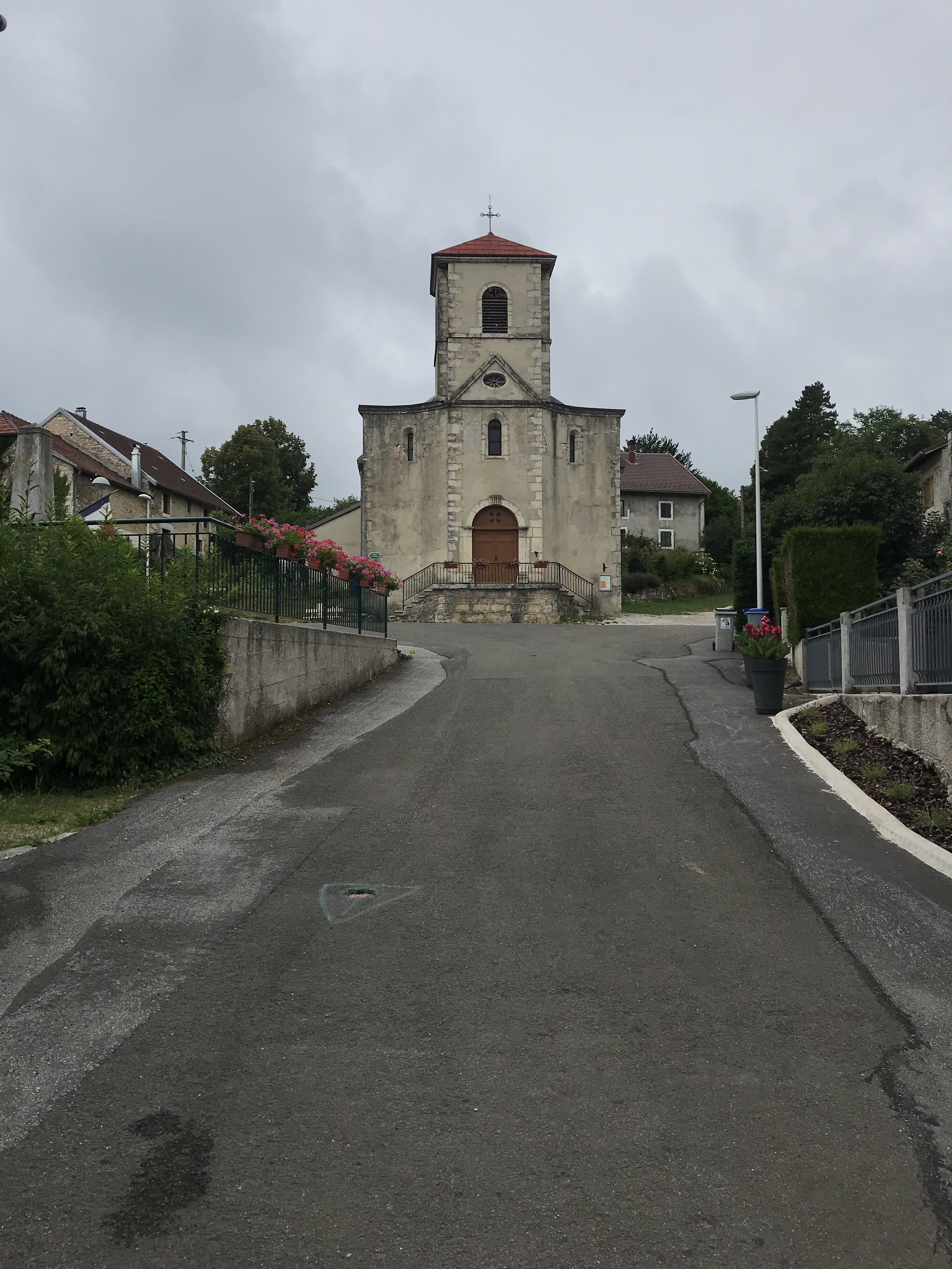 Image de Rogna, Jura, France.